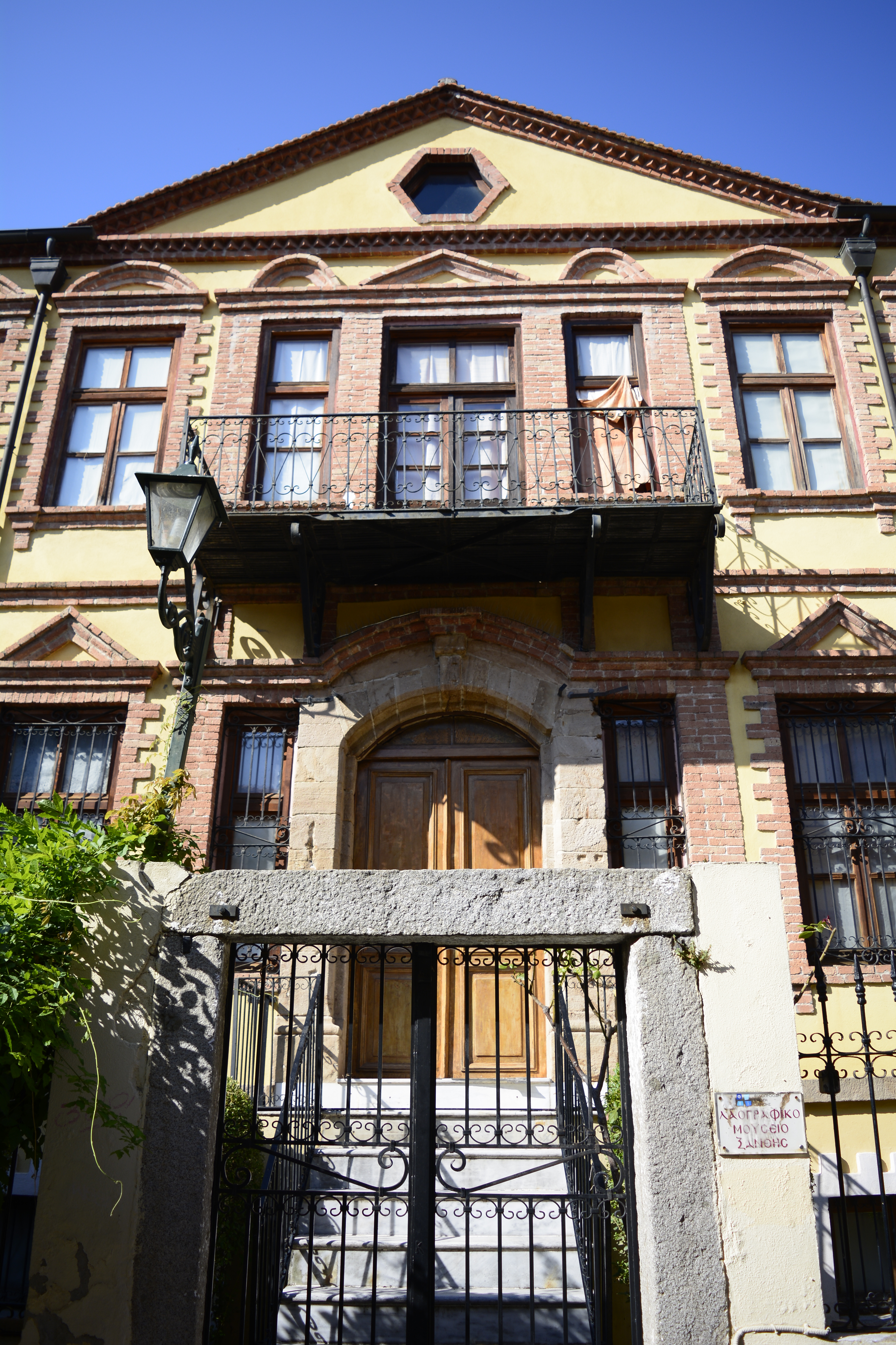 Λαογραφικό Μουσείο Ξάνθης«Αρχοντικό Κουγιουμτζόγλου»